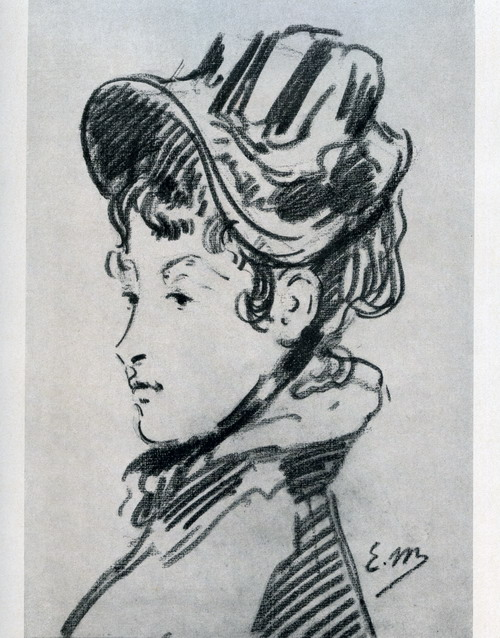 Пані Гійєме: підготовчий малюнок до портрета